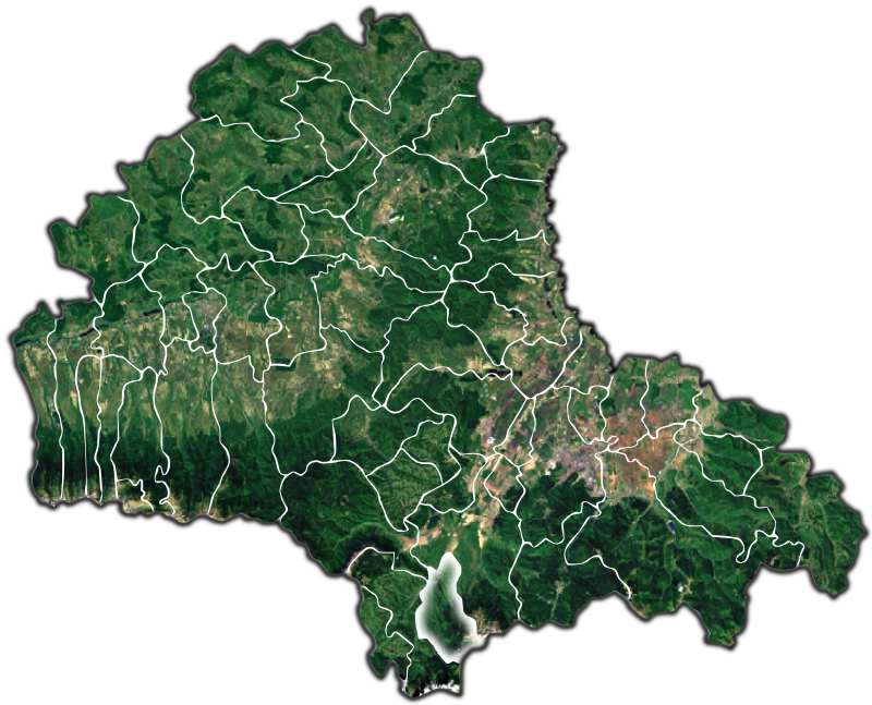 Bran jud Brasov